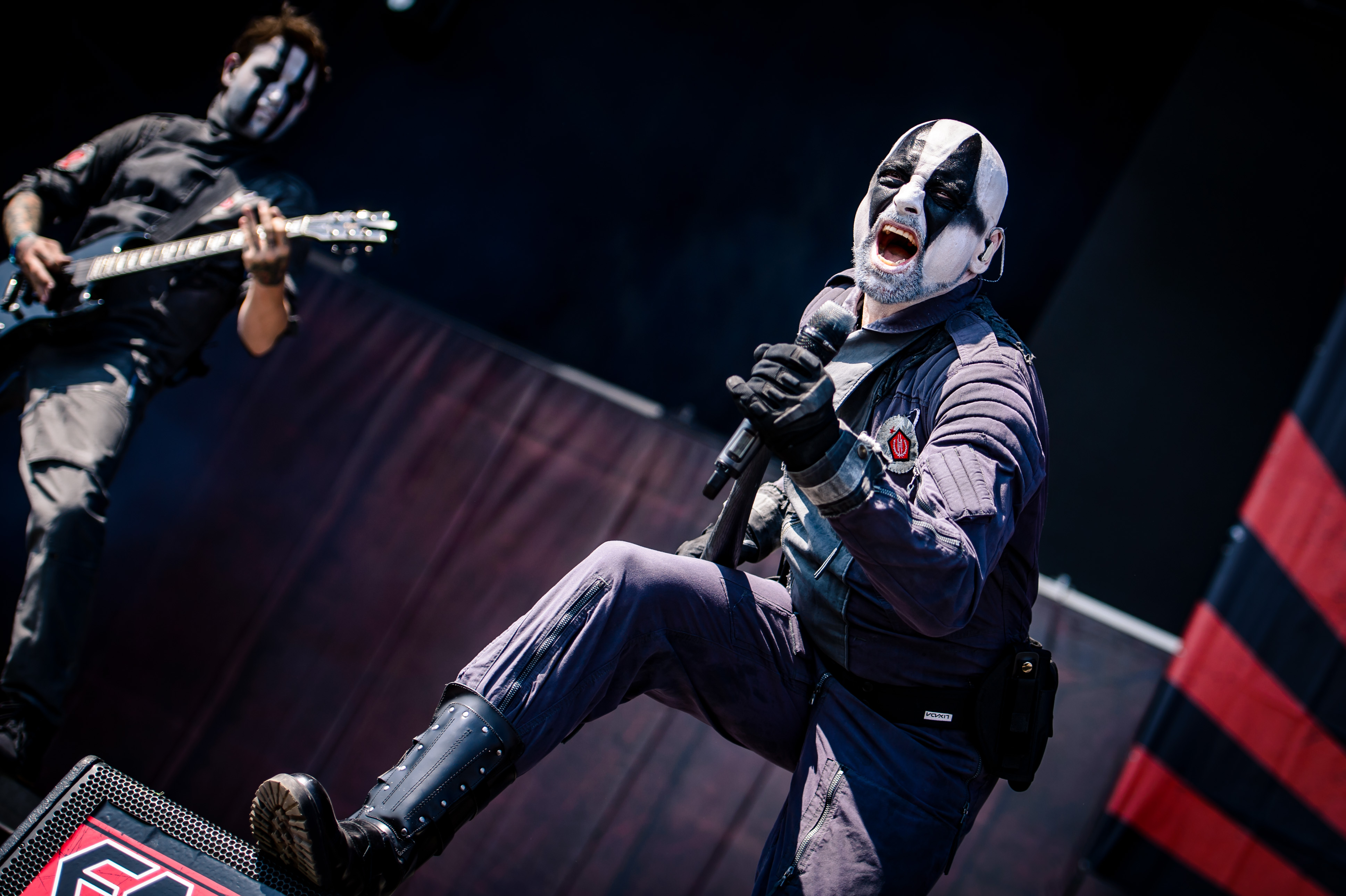 'Summer Breeze Festival 2018; Dinkelsbühl': 'Megaherz'